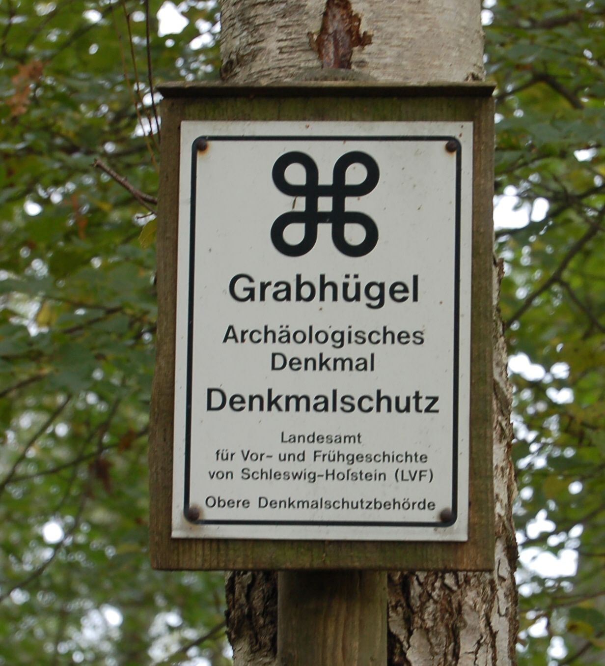 Hinweisschild Grabhügel in Appen,Kreis Pinneberg